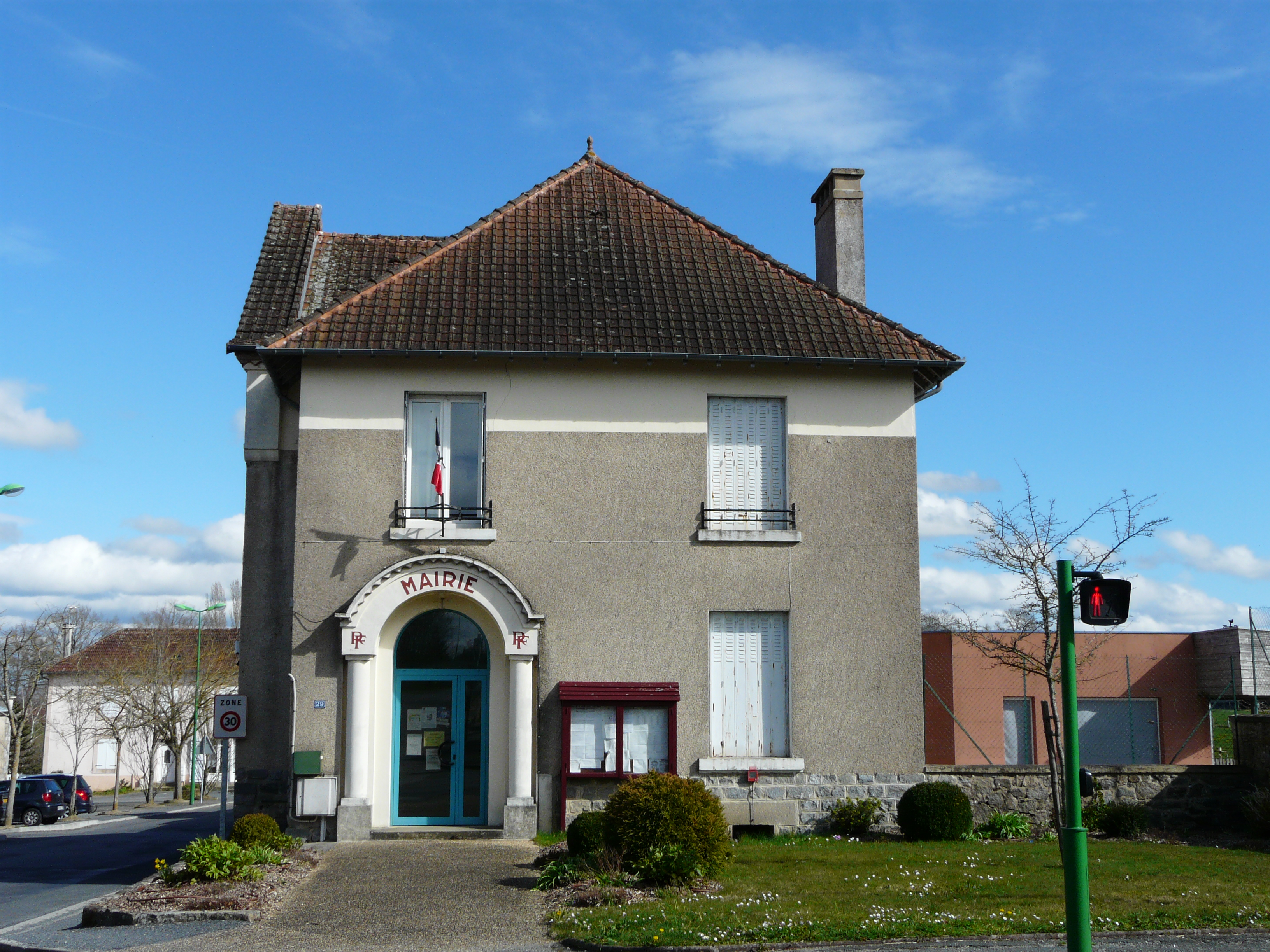 La mairie de Saint-Maurice-les-Brousses, Haute-Vienne, France.